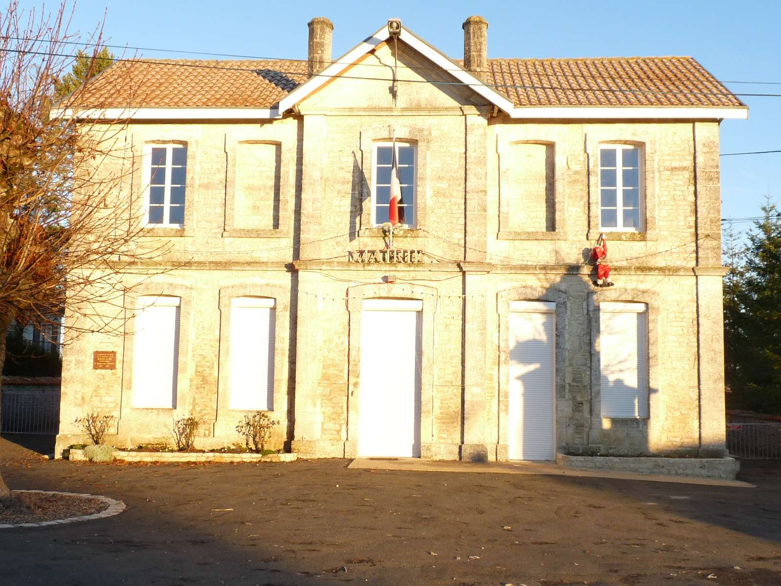 mairie d'Aussac-Vadalle à Vadalle, Charente, France